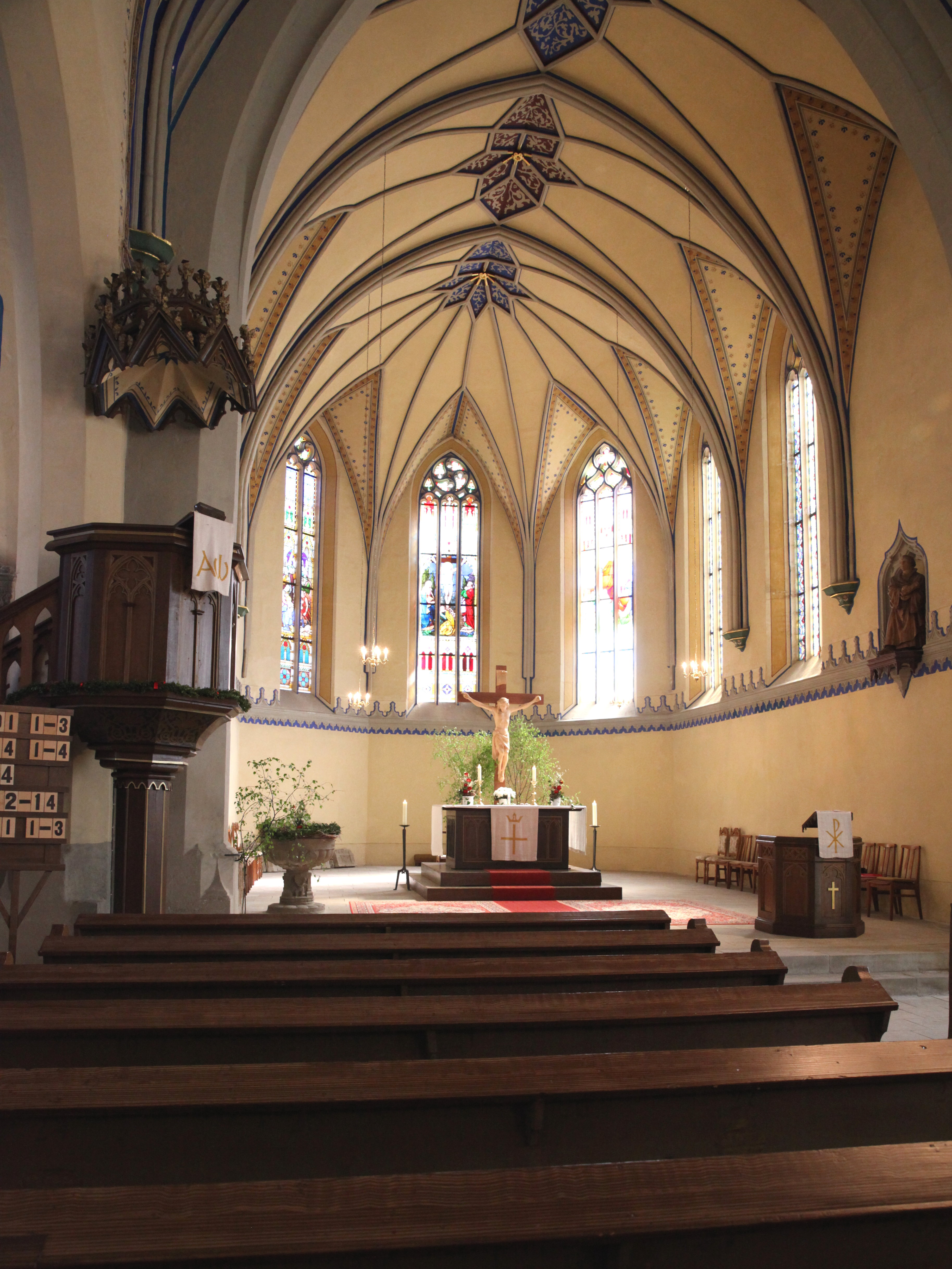 Chor, Evangelische Stadtkirche Unserer lieben Frauen, Heldburg